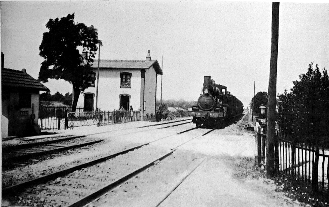 autour de l'aérodrome de Champagne.